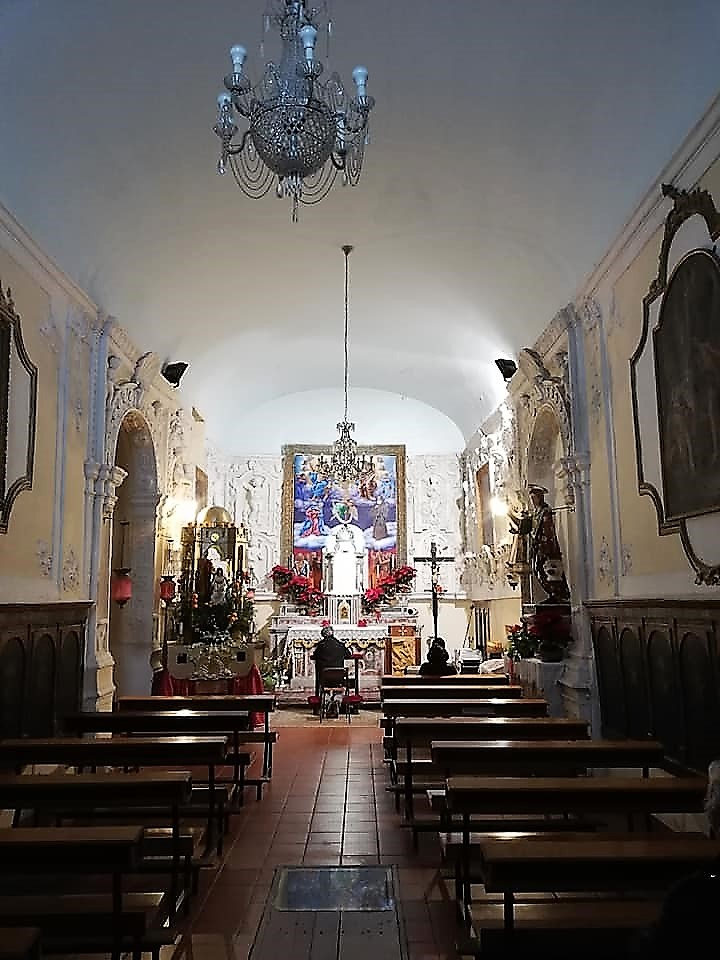 Navata e botola cripta